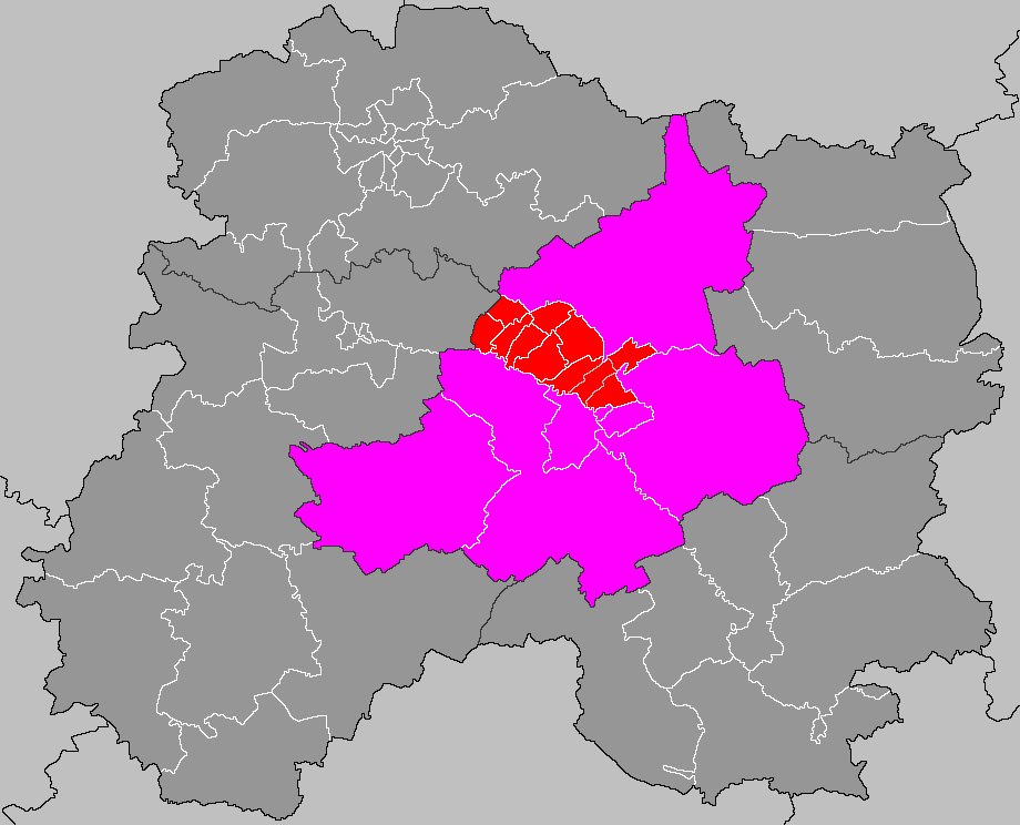 Localisation du canton de Châlons-en-Champagne-2